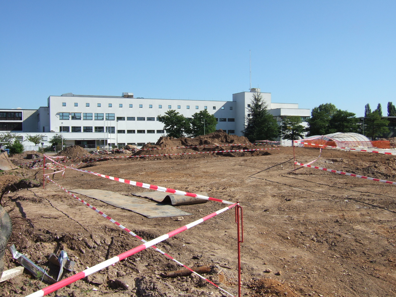 Grabungen vor dem Bundeshaus, Bonn